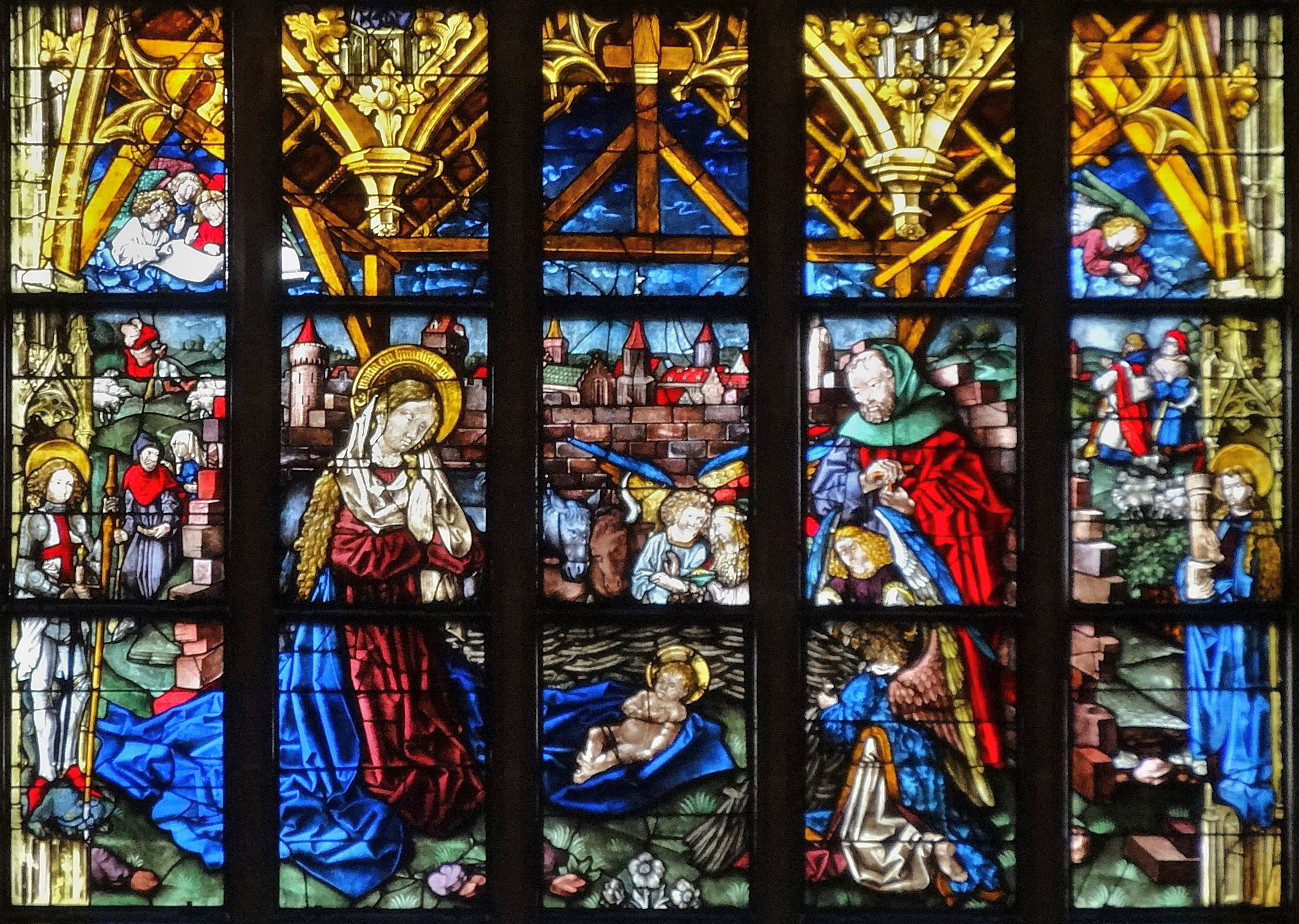 Frauenkirche (München), gotisches bemaltes Fenster (Peter Hemmel von Andlau)